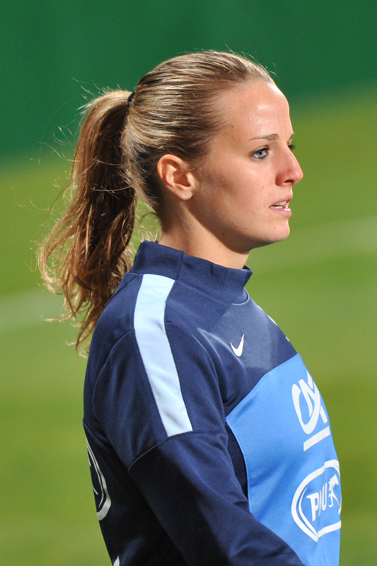 FIFA Women's World Cup 2015 Qualiying Round Österreich - Frankreich am 31. Oktober 2013 in Ritzing: Sandie Toletti